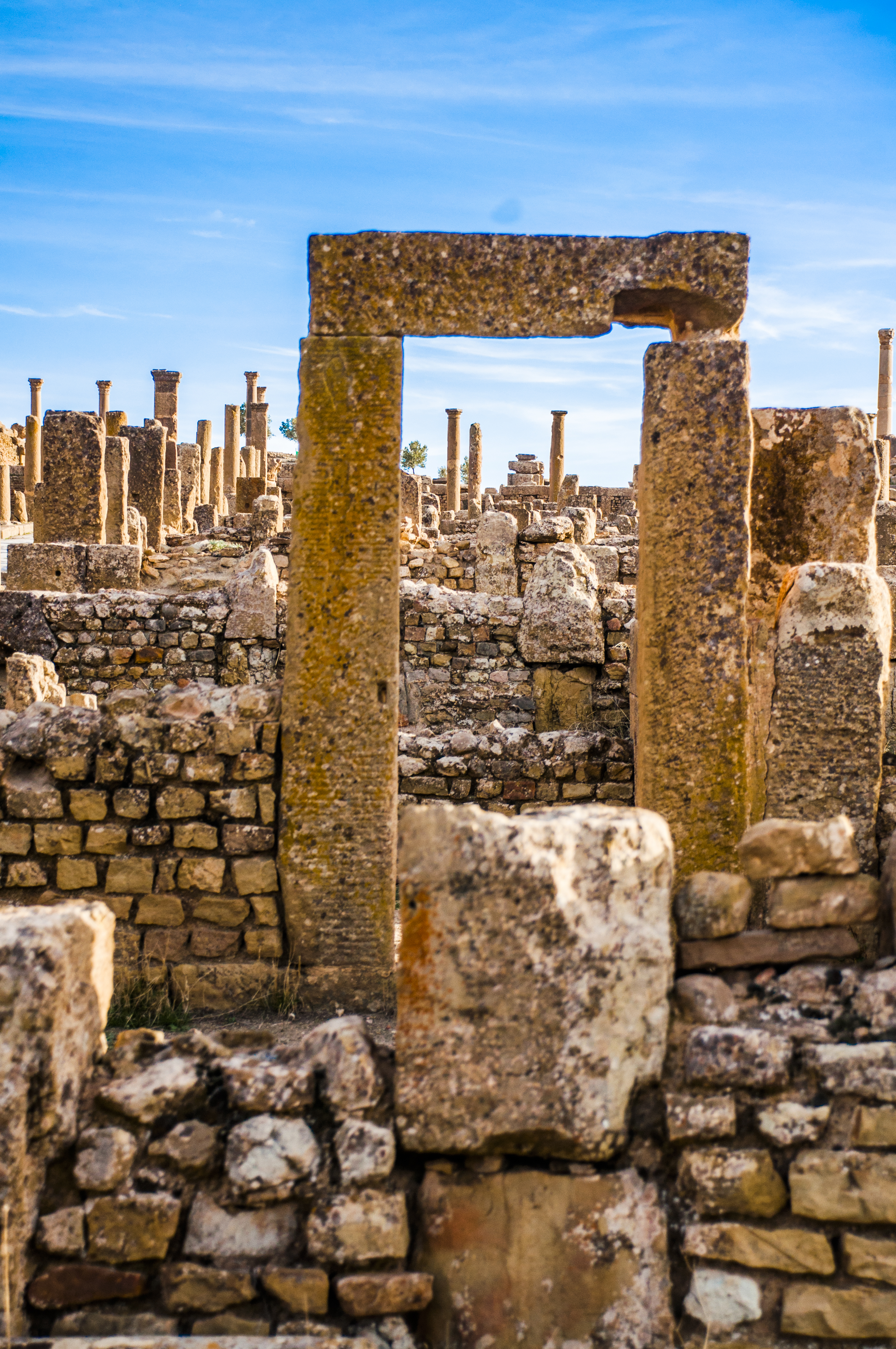 صورة من آثار المباني المدينة الرومانية القديمة تمقاد بولاية باتنة